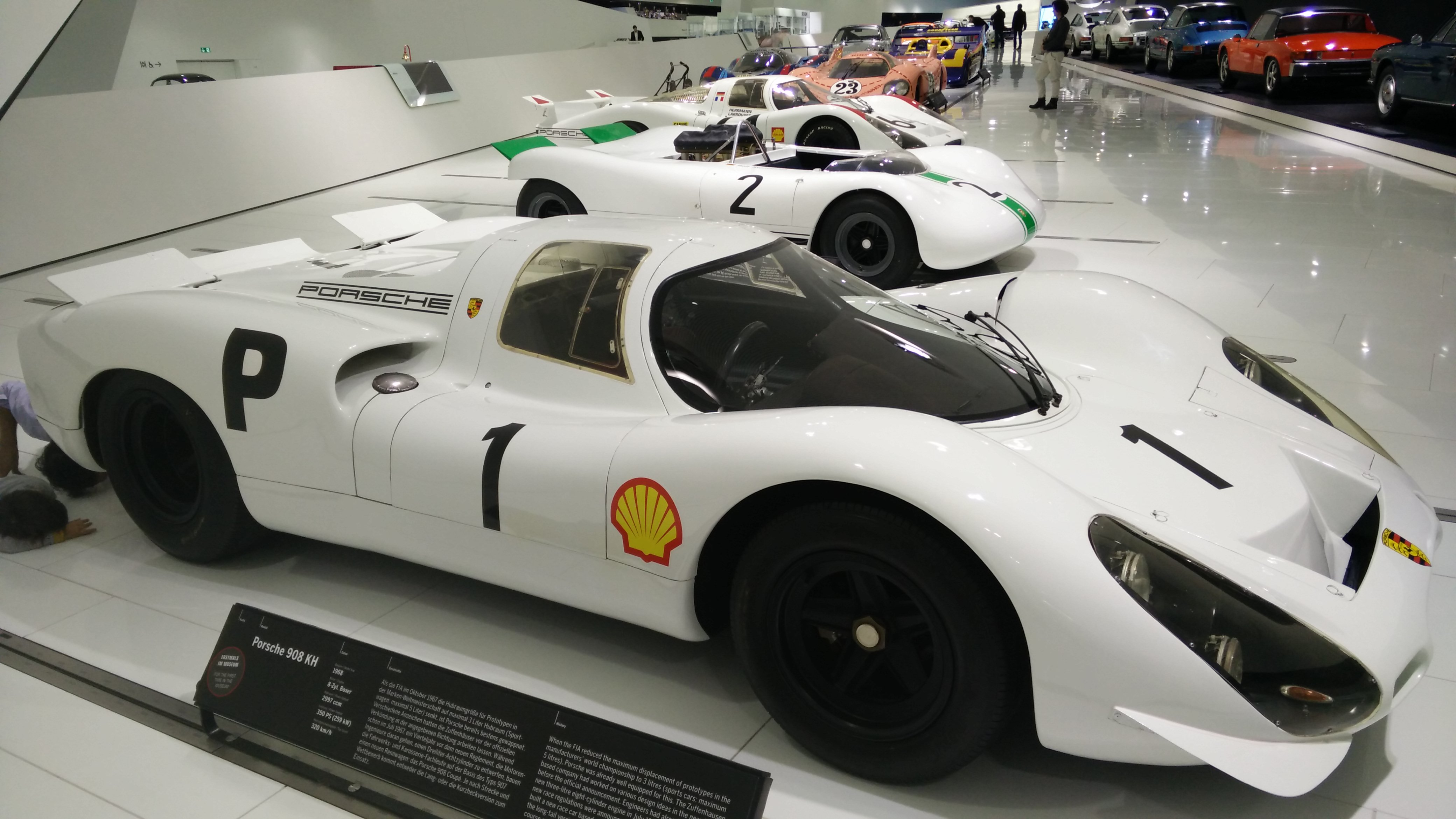 IMG_20141112_114629